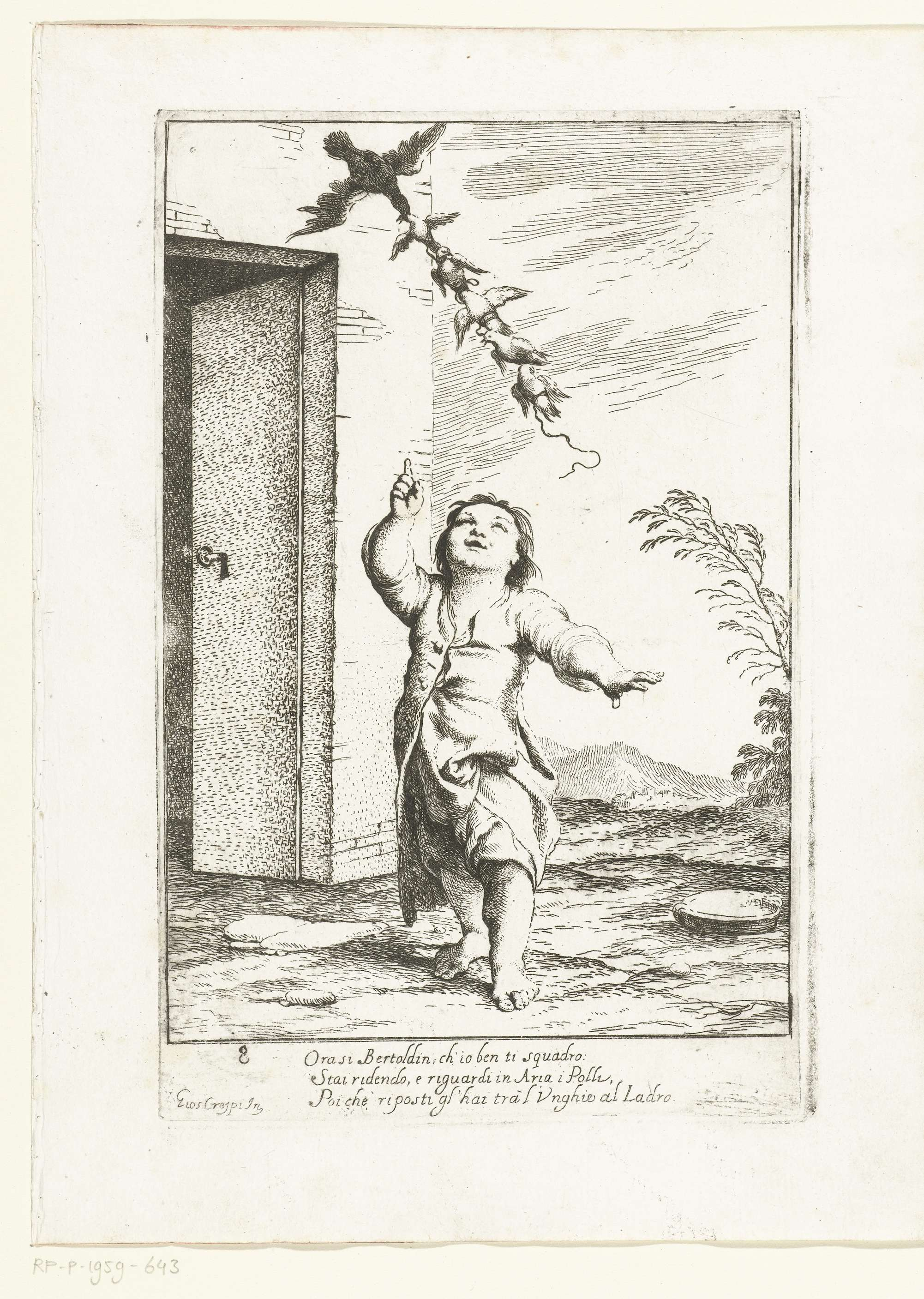 Bertoldino wijst naar de kippen die hij met een touw aan aan elkaar heeft gebonden. Zij worden meegevoerd door een Kiekedief. Onder de voorstelling een drieregelig rijmpje in het Italiaans. Prent uit een reeks van acht met de streken van Bertoldino, onderdeel van een serie van twintig prenten.; Iconclasscode: 82; Iconclasscode: 25F33(KITE); print